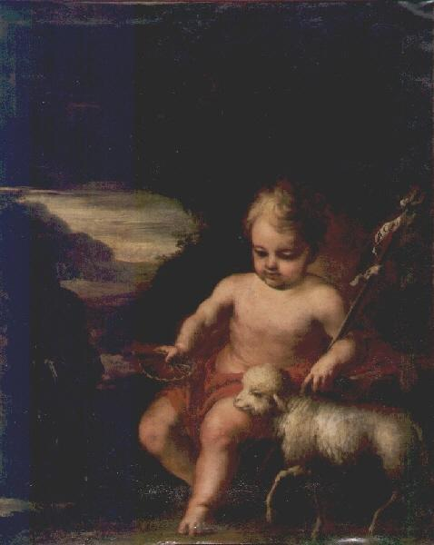 La obra representa al profeta San Juan Bautista cuando aún era niño.